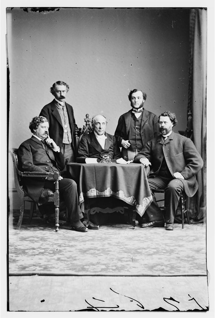 Cinq membres du bureau de la Sanitary. De gauche à droite, William Holme Van Buren, George Templeton Strong (trésorier), Henry Whitney Bellows (président), Cornelius Rea Agnew et Oliver Wolcott Gibbs (Library of Congress, Prints and Photographs Division LC-B813- 1816 B)